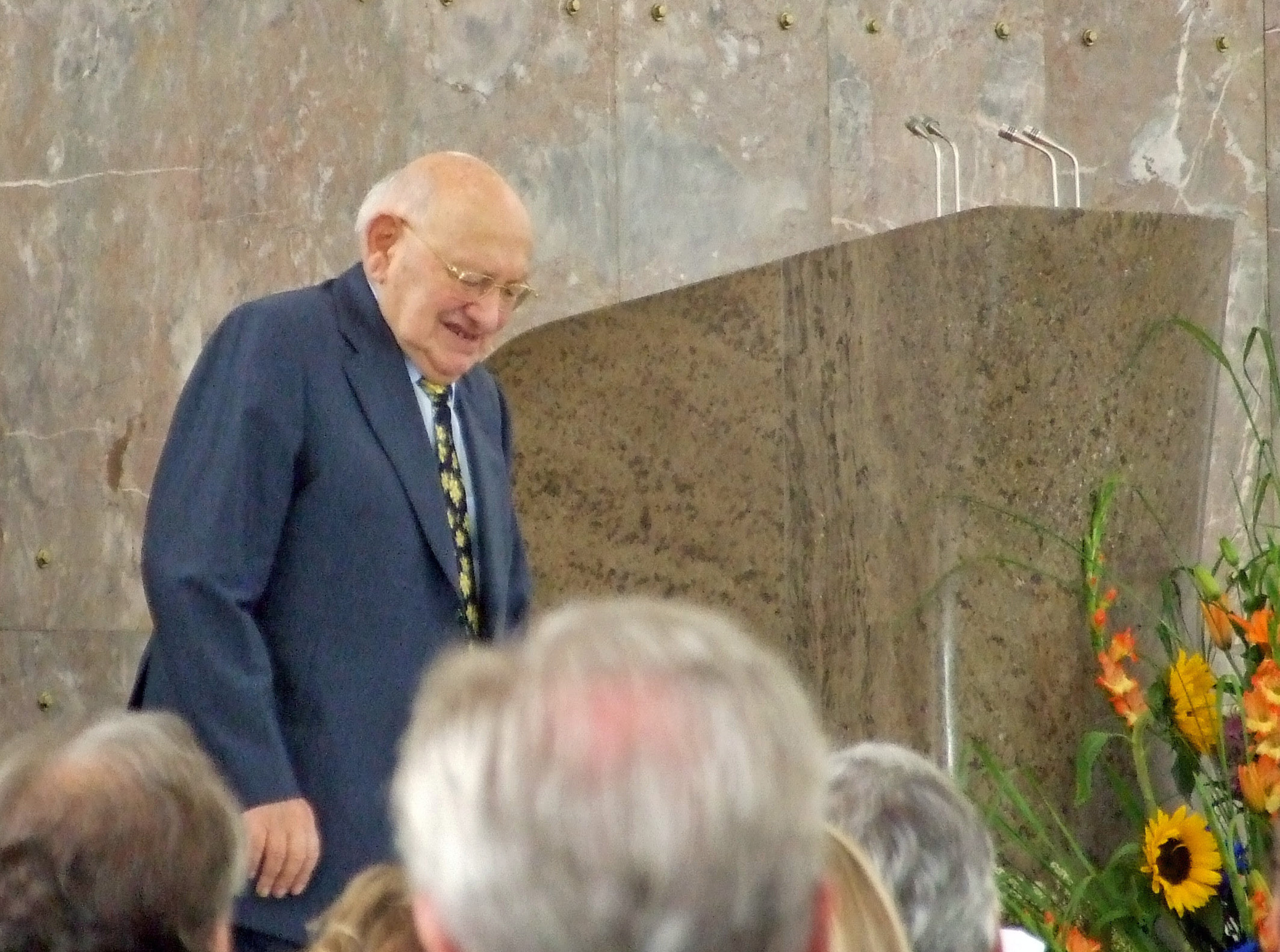 Marcel Reich-Ranicki, waehrend der Boerne-Preis-Feier, 2007 in Ffm